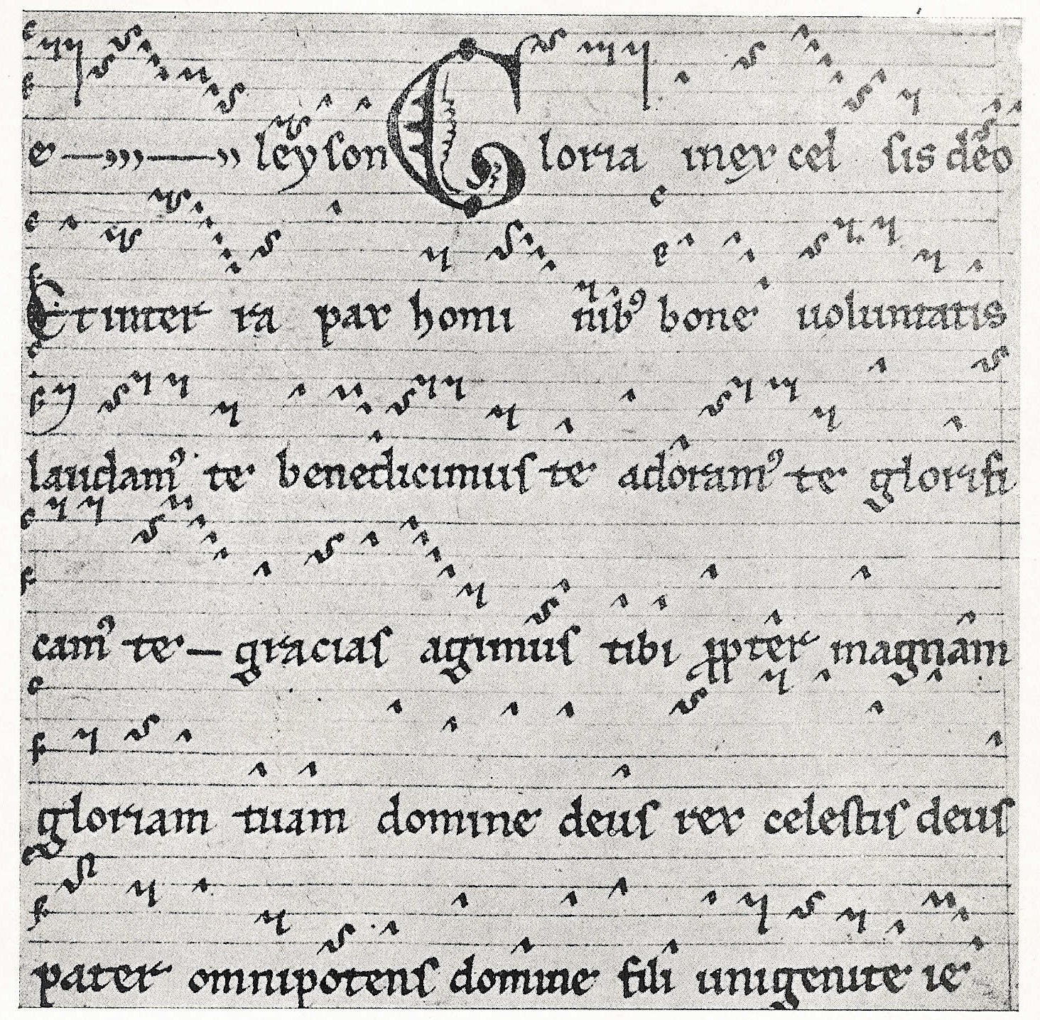 Agenda Tobiášova, Praha, Rombika jacentní